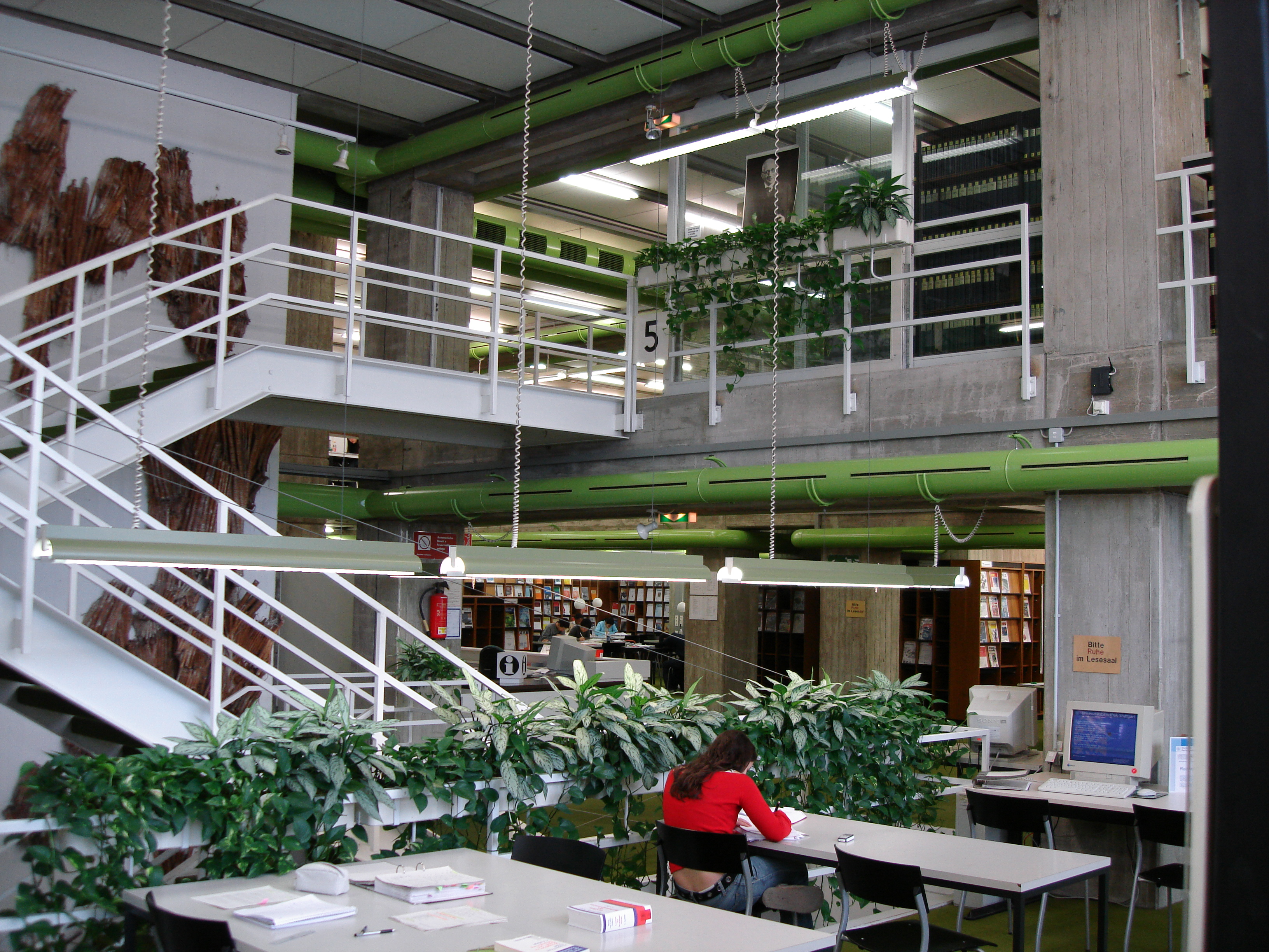 Universitätsbibliothek der Universität Stuttgart